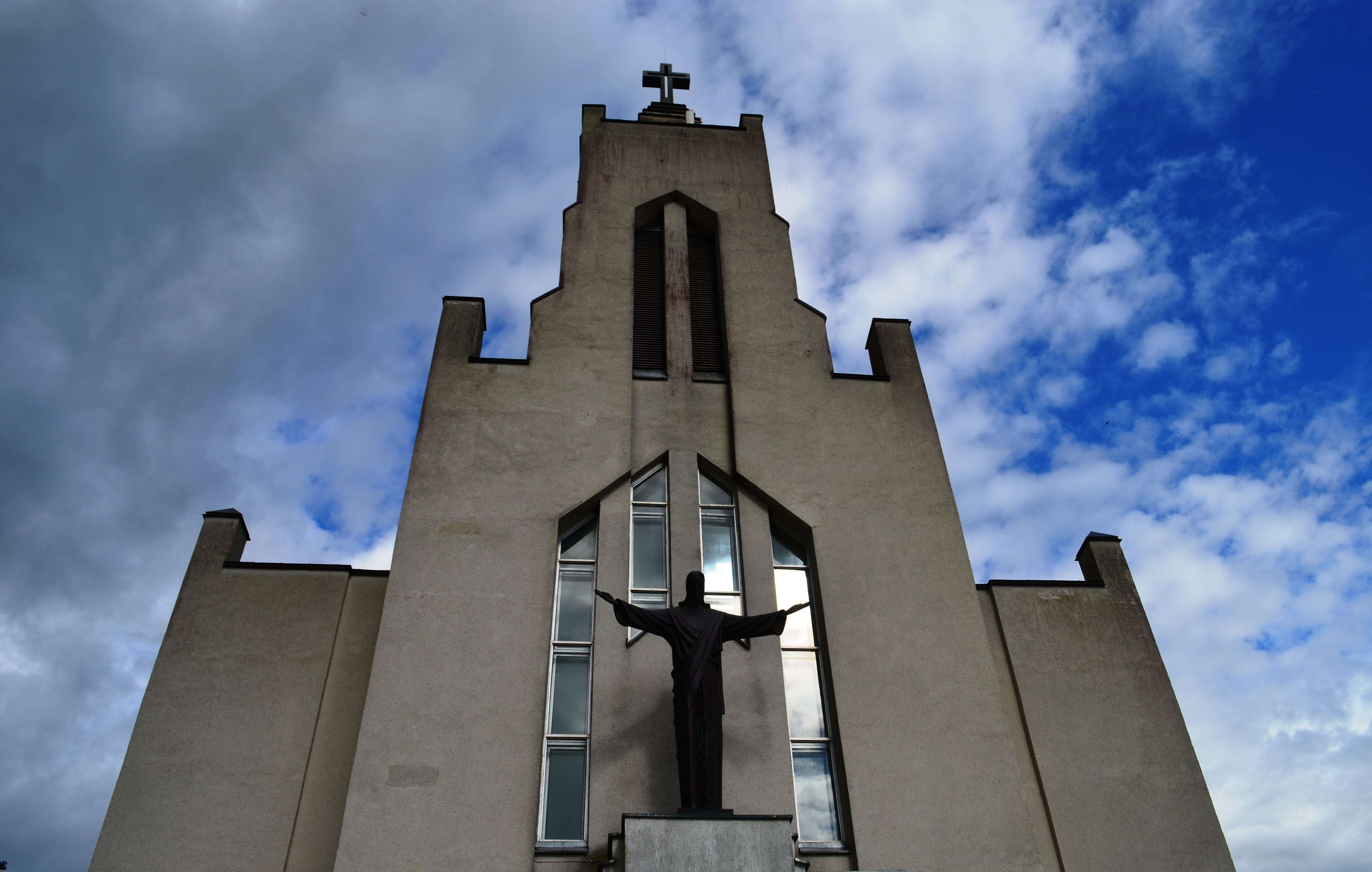 Truskava, Kėdainių raj.